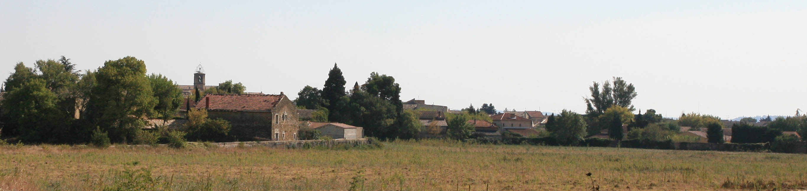 the village of Sérignan du Comtat, Vaucluse, France